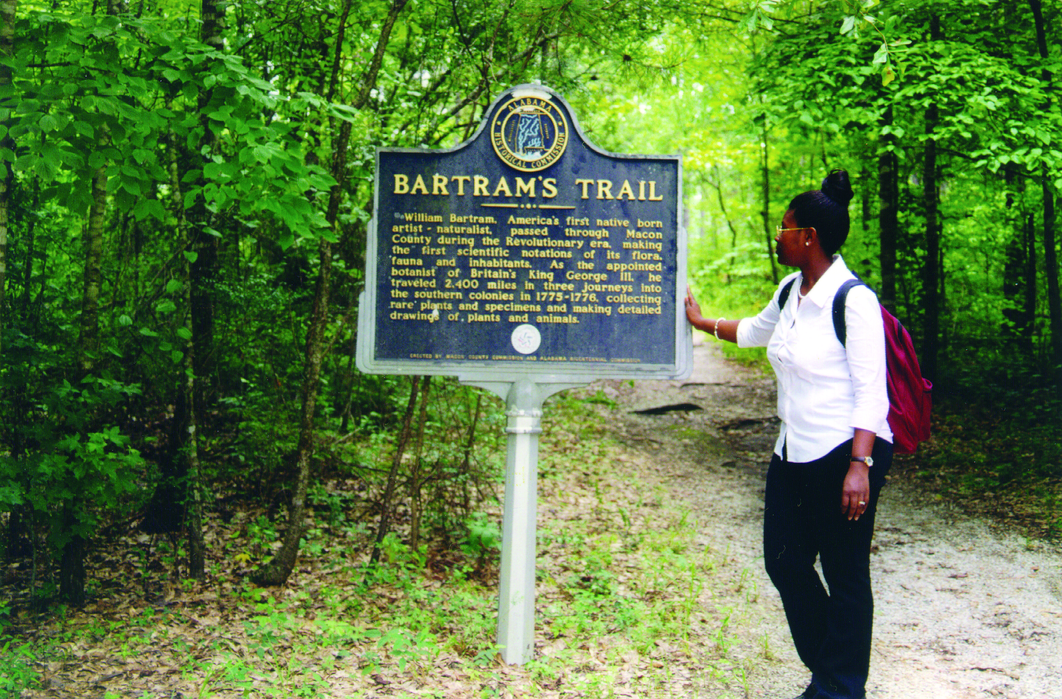 Bartram Trail Tuskegee NF (334) 727- 2652